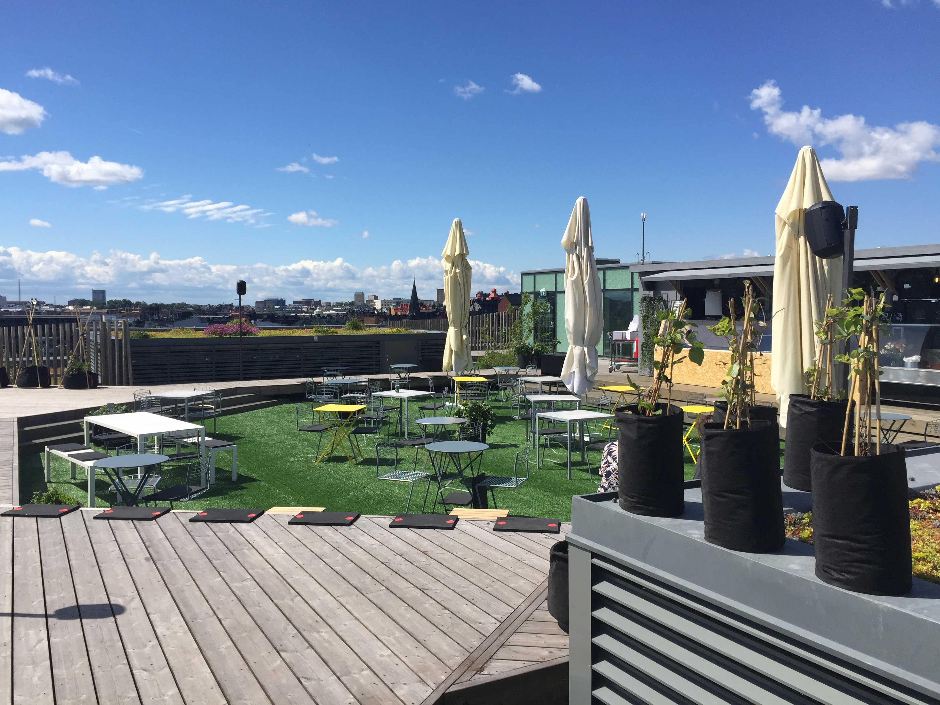 Urban Delis takterass på Sveavägen 44